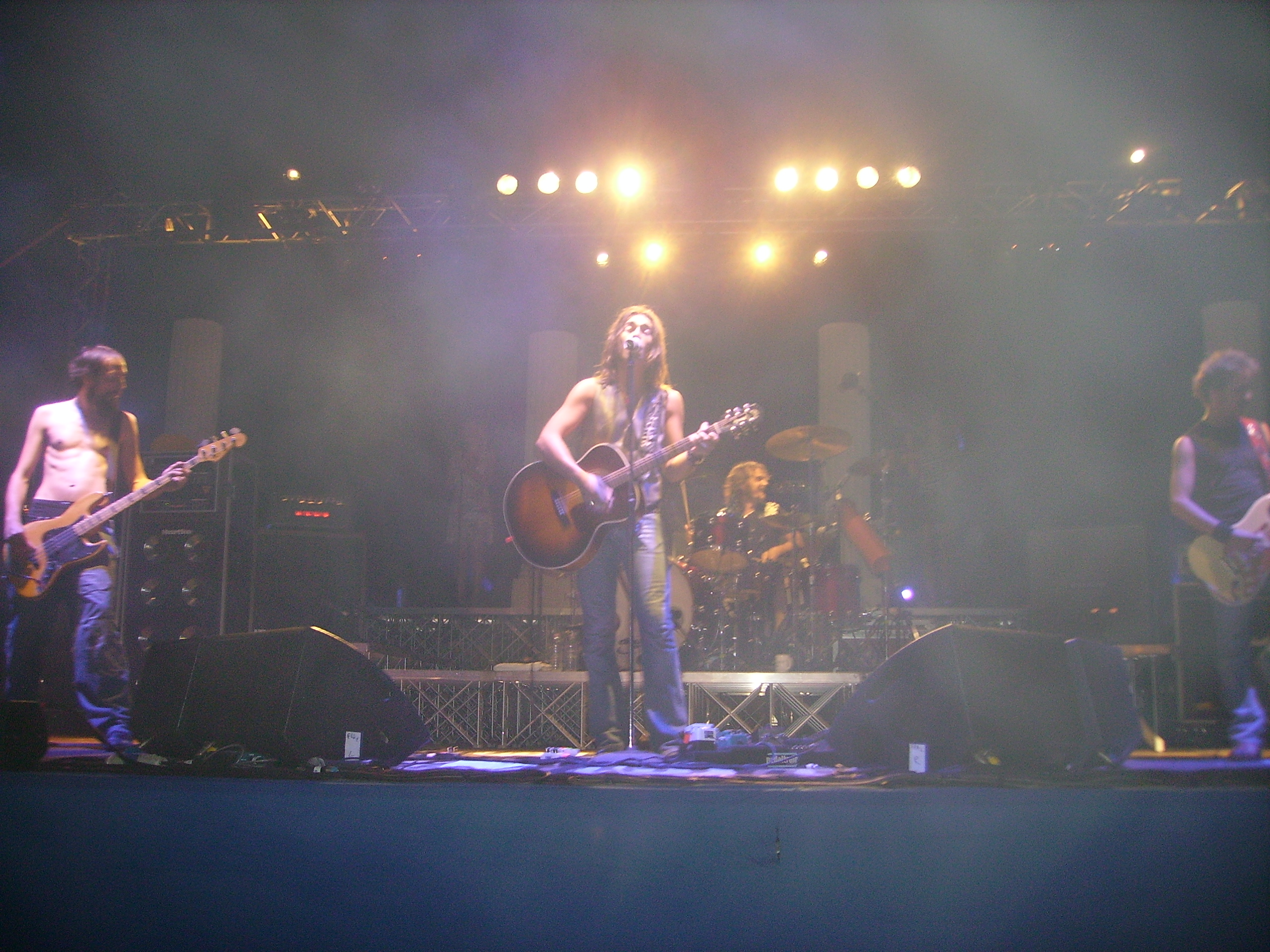 Autore: Tilotta Antonino Fonte: Scatto in concerto dal vivo Descrizione: Le Vibrazioni in concerto a Partanna (TP)anno 2007 Free: sono l'autore rilascio diritti